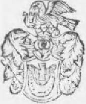 Herb Jastrzębiec z "Kleynoty abo herby państwa y rycerstwa powiatow y miast głownych Korony Polskiey y W. X. L. według obiecadła dla pamięci łacnieyszey położone" wydanego w 1630 , napisanego przez Gorczyna Jana Aleksandra